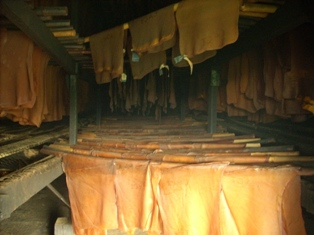 Proses pengasapan karet sit asap